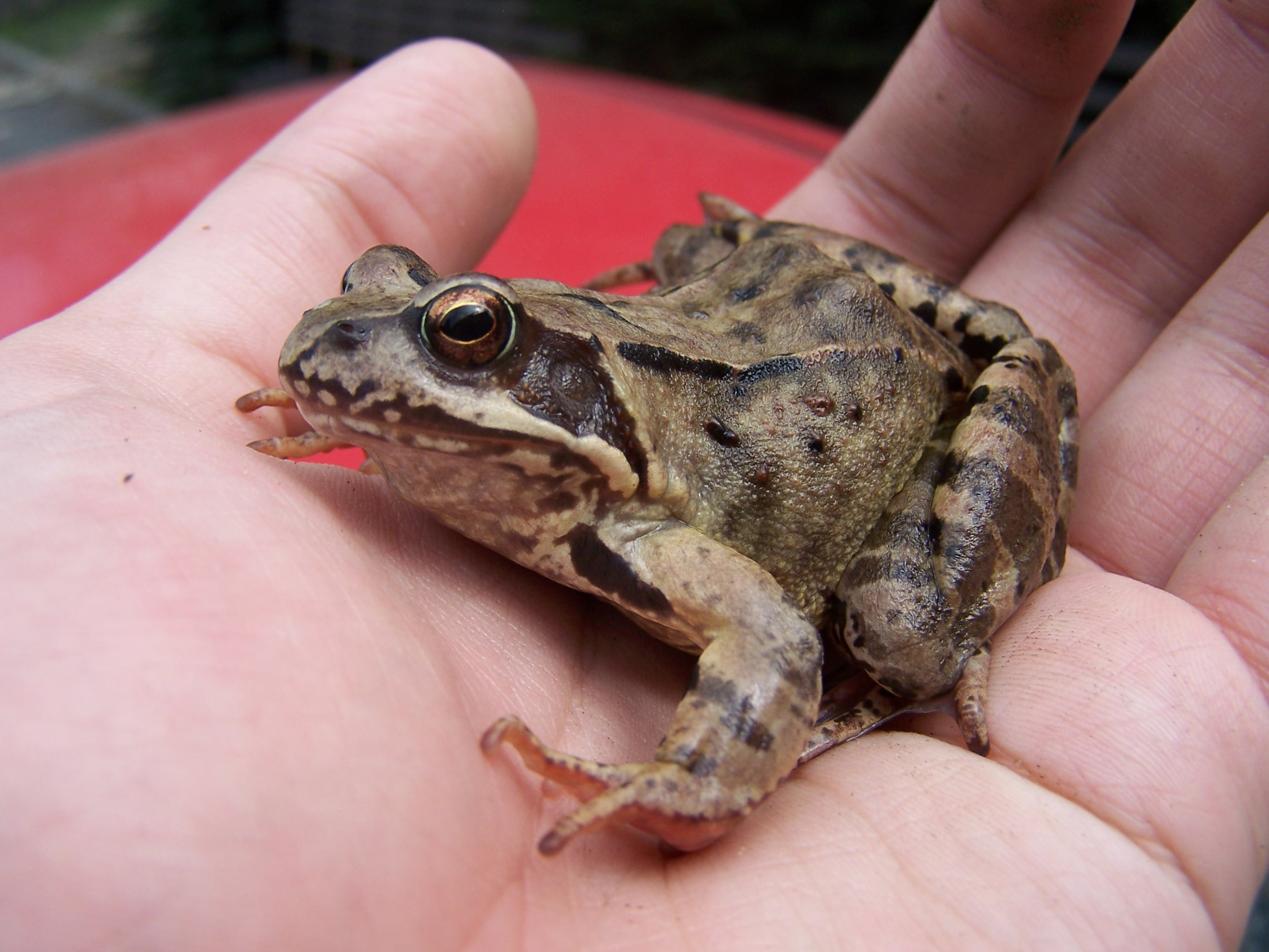 Rana temporaria in hand